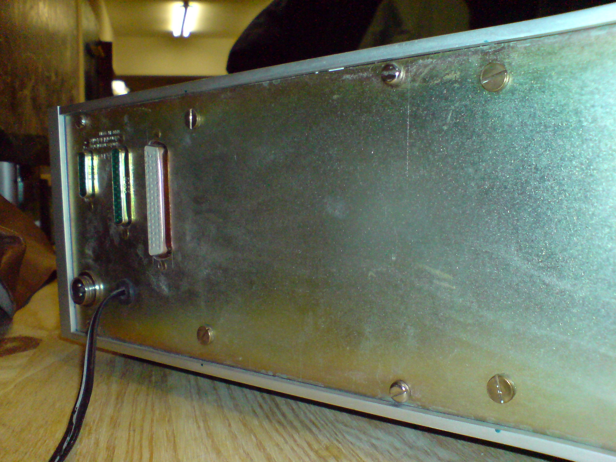 Prototipo de Comelta Drac-1, basado en Rockwell AIM-65 detalle de conectores de la caja de ampliación